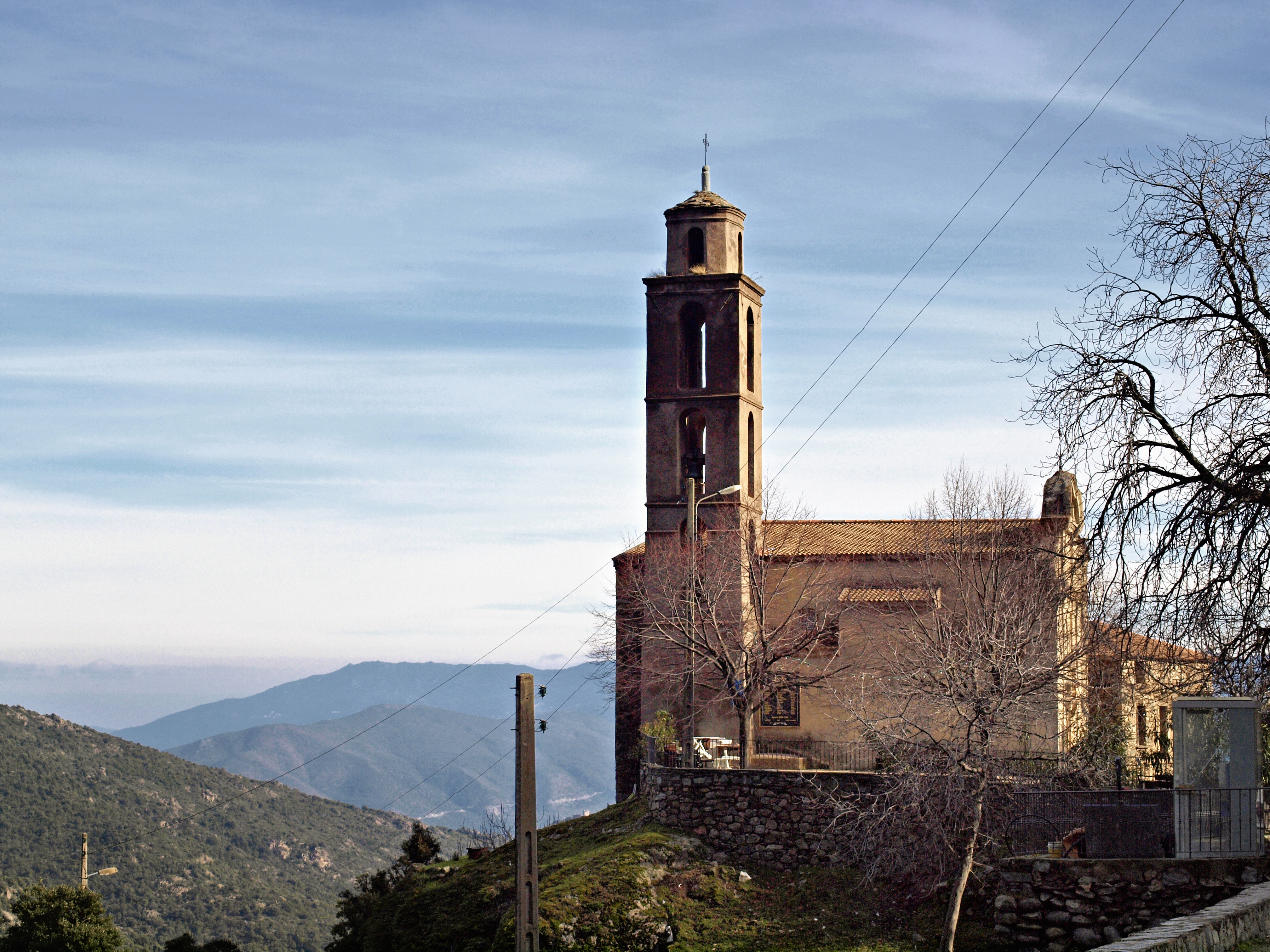 Popolasca (Corsica) - L'église paroissiale Saint-Dominique